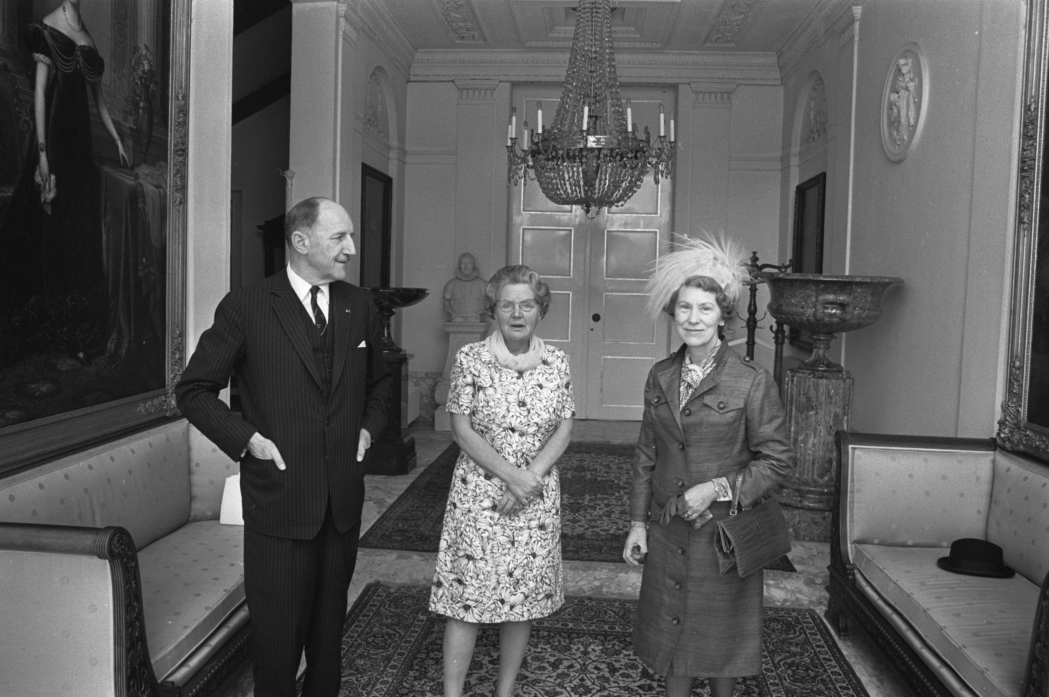 Collectie / Archief : Fotocollectie Anefo Reportage / Serie : Koningin Juliana ontvangt secretaris-generaal van de NAVO Joseph Luns en zijn echtgenote op Paleis Soestdijk Beschrijving : Joseph Luns, zijn vrouw Elisabeth Cornelia Baronesse van Heemstra en koningin Juliana Datum : 9 mei 1972 Locatie : Baarn, Utrecht Trefwoorden : audiënties, koninginnen, secretaris-generaals Persoonsnaam : Heemstra, Elisabeth Cornelia Baronesse van, Juliana (koningin Nederland), Luns, Joseph Fotograaf : Fotograaf Onbekend / Anefo Auteursrechthebbende : Nationaal Archief Materiaalsoort : Negatief (zwart/wit) Nummer archiefinventaris : bekijk toegang 2.24.01.05 Bestanddeelnummer : 925-5891